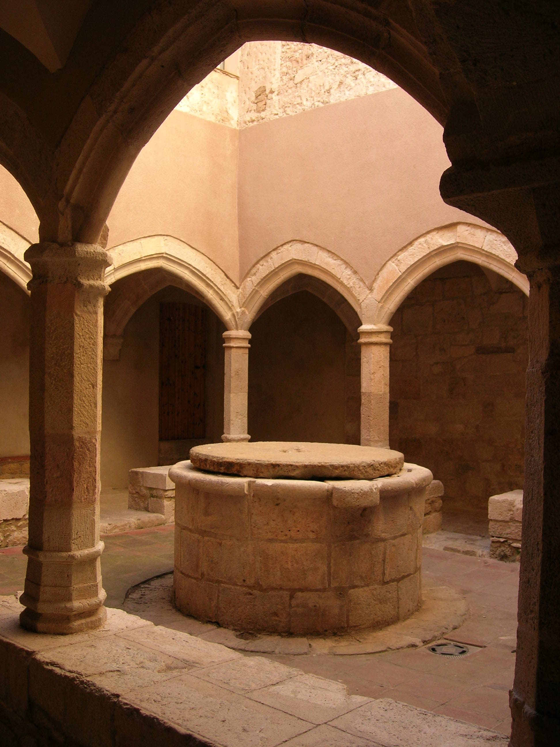 Monastère de Santes Creus, Catalogne, Espagne.